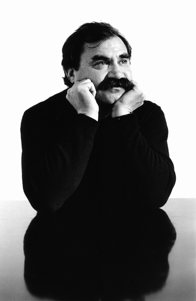 Maurice Roucel by Guillaume Luisetti